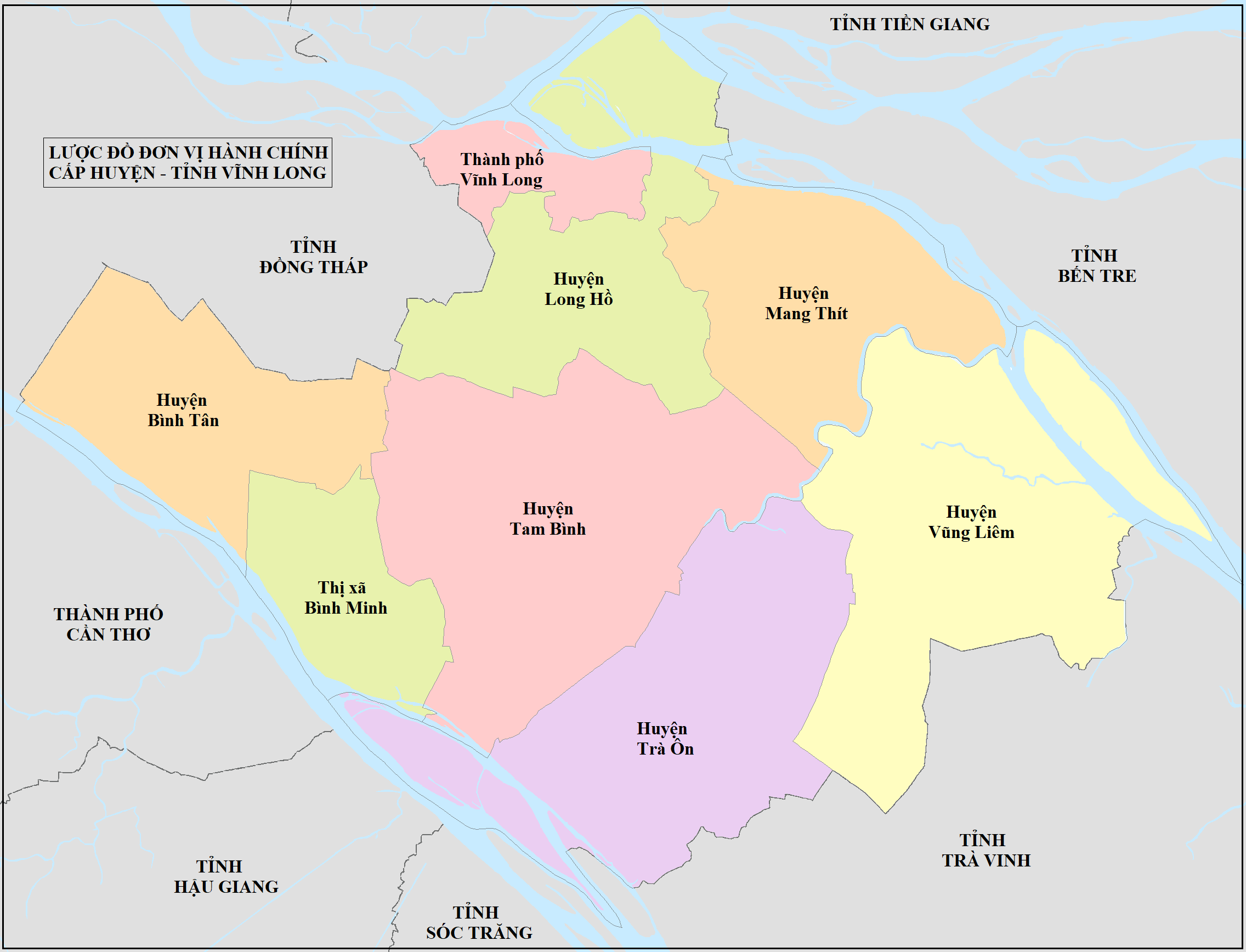 Lược Đồ Hành chính cấp huyện tỉnh Vĩnh Long